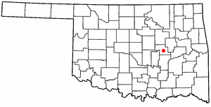 Locator map of Okemah, Oklahoma.